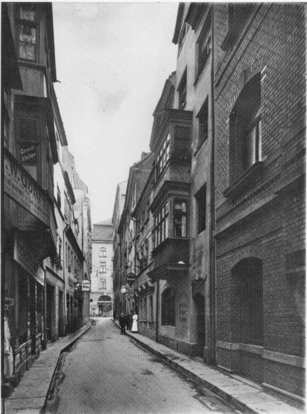 Das Preußergäßchen um 1903. Im Hintergrund ist die Fassade des Städtischen Kaufhauses zu sehen.